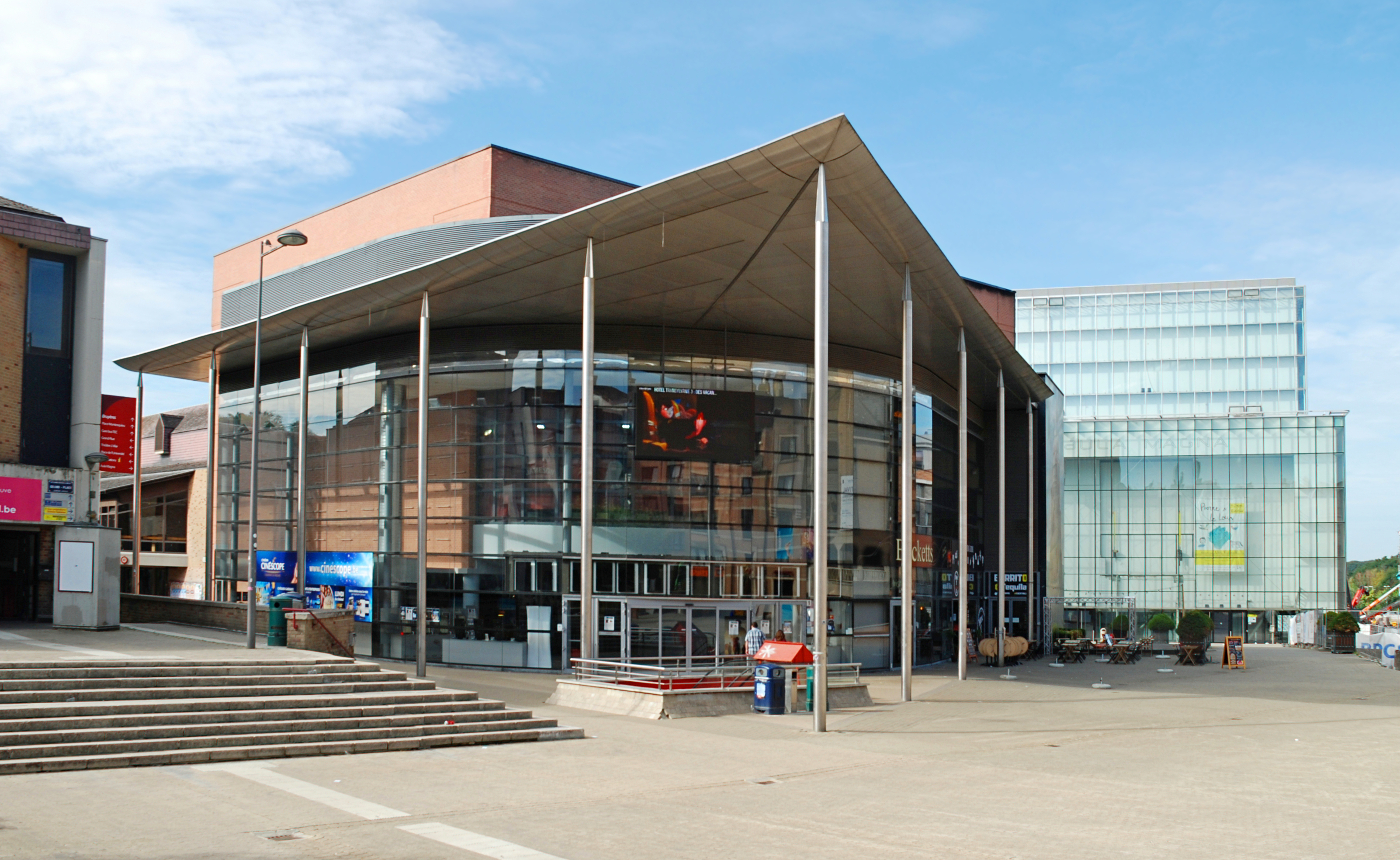 Belgique - Louvain-la-Neuve - Grand-Place - cinéma UGC (architecture de style postmoderne) This photo of immovable heritage has been taken in the Walloon Region